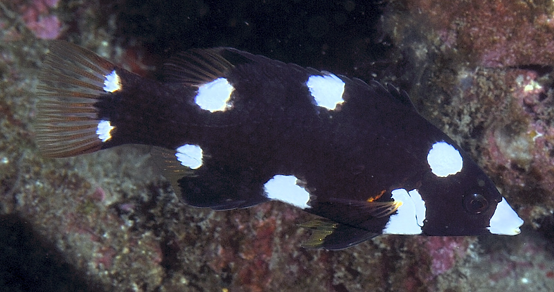 Un tamarin ou labre à tache axilliaire (Bodianus axillaris) juvenile à la Réunion en février 2013.